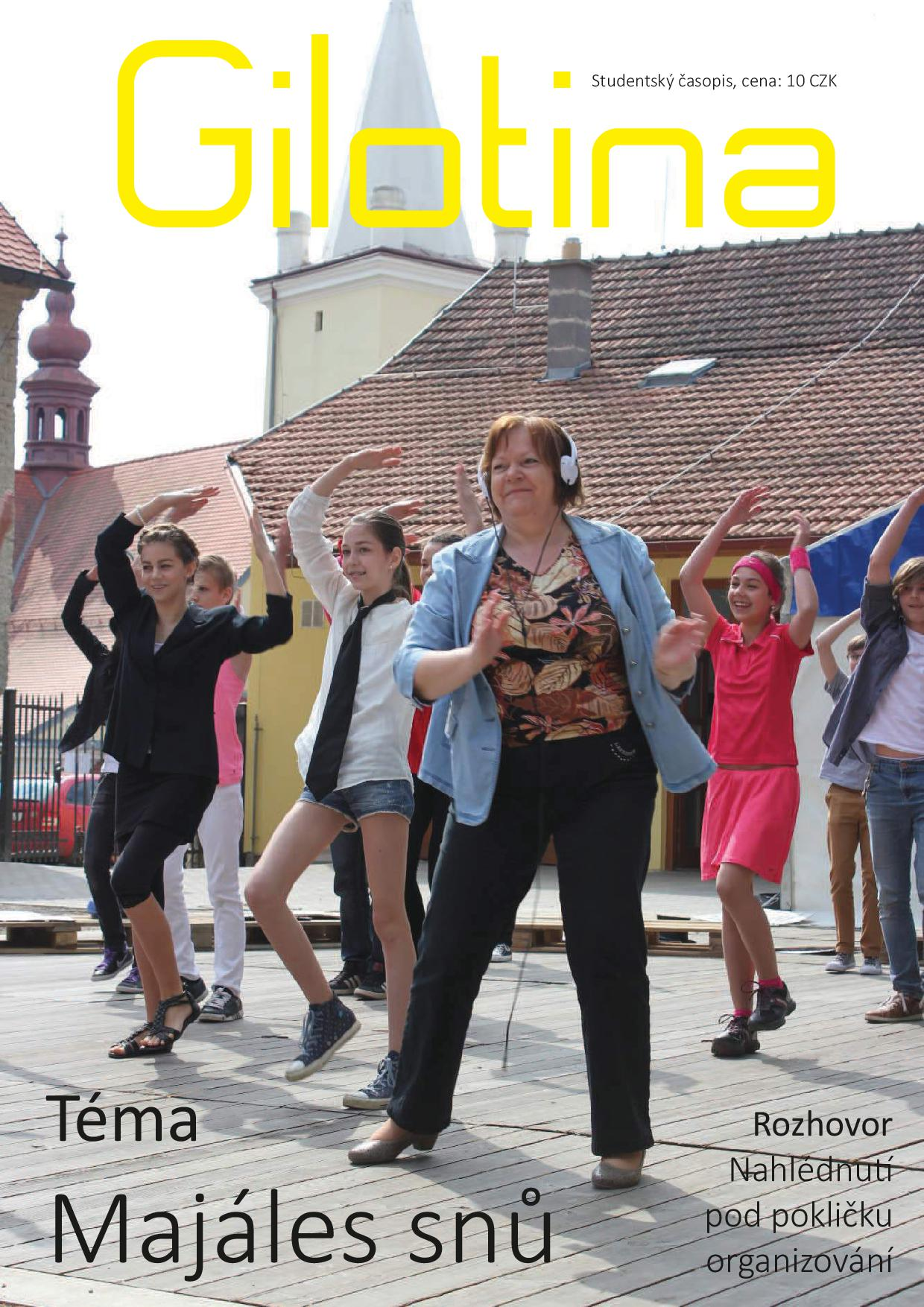 Studentský časopis Gymnázia Brno-Řečkovice. Ročník XX.